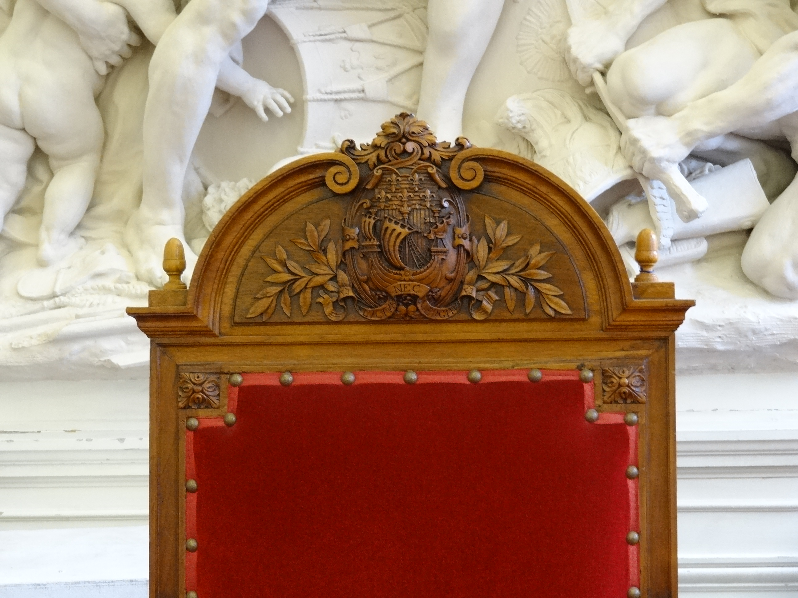 Paris 10e - Mairie - fauteuil du maire dans la salle des mariages